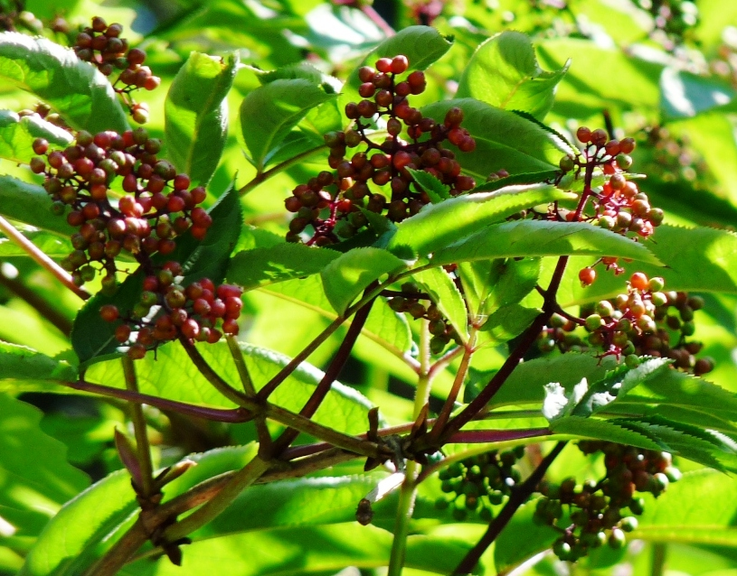 Sambucus pubens (Stinkender Holunder), Botanischer Garten Frankfurt